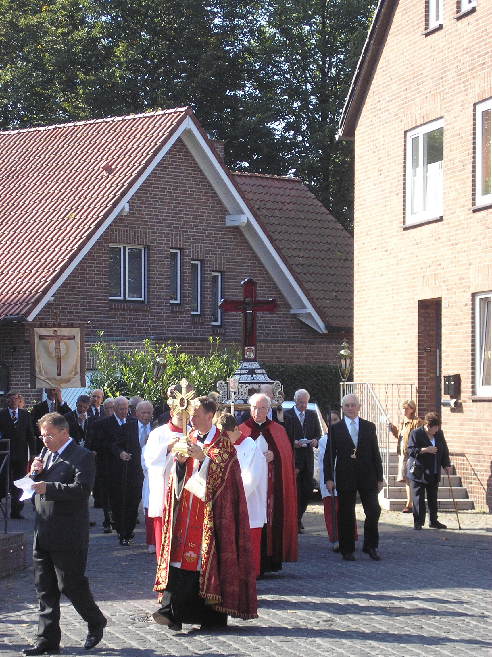 Kreuztracht durch Kranenburg 2007 - in der Bildmitte das wundertätige Kreuz